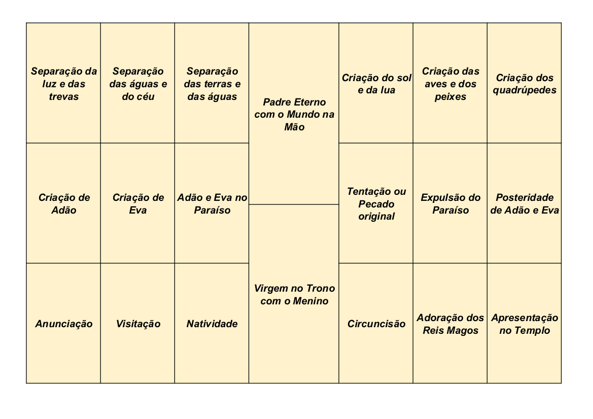 Reconstituição do Políptico da Capela-mor da Catedral de Lamego segundo a proposta de Dalila Rodrigues em "MODOS DE EXPRESSÃO NA PINTURA PORTUGUESA - O PROCESSO CRIATIVO DE VASCO FERNANDES", Dissertação de Doutoramento apresentada à Faculdade de Letras da Universidade de Coimbra na especialidade de História da Arte, 2000, pag. 250 [1]